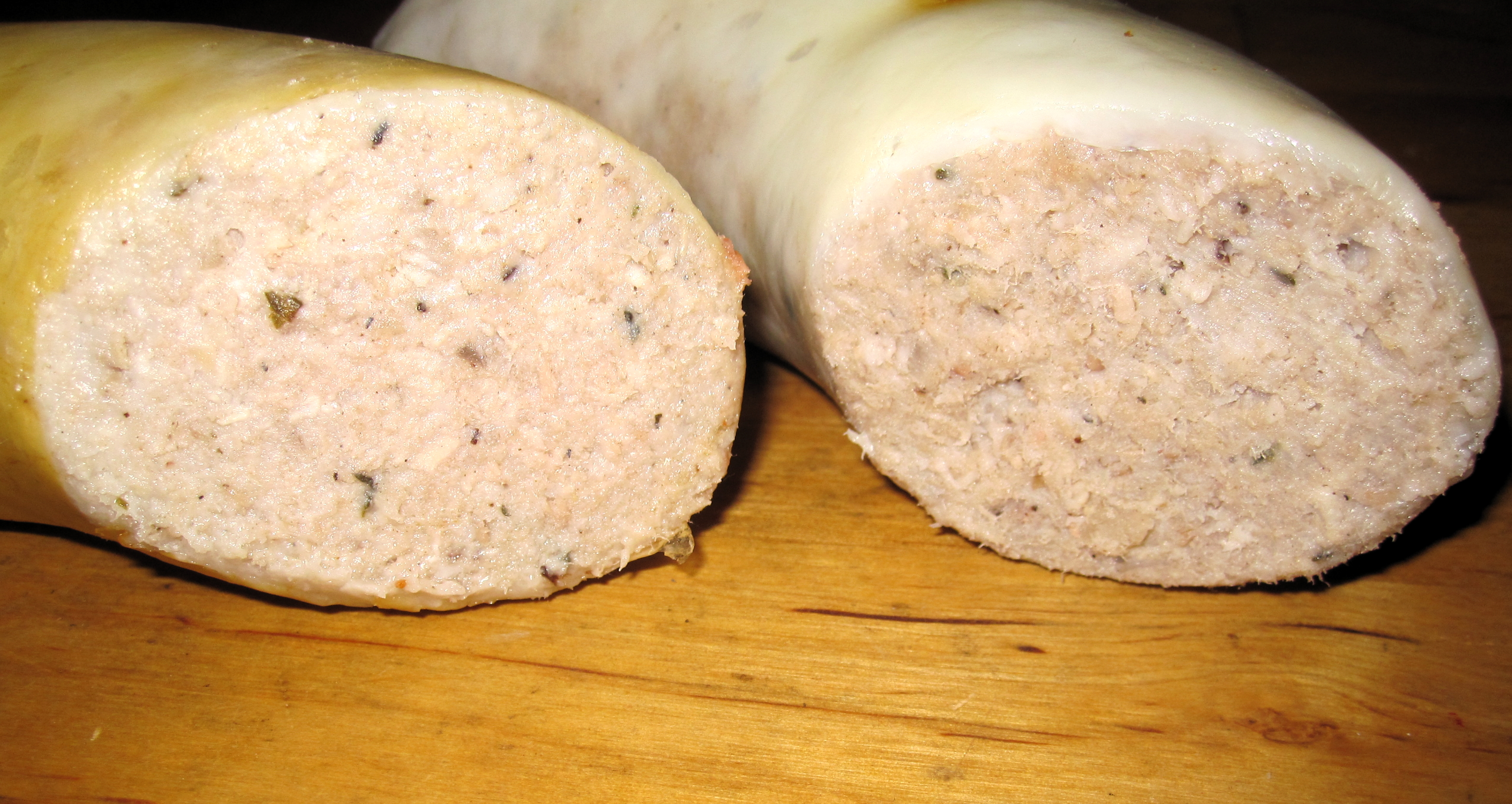 Für die Stadt und die Region Braunschweig typische Knackwurst als Frischwurst im Naturdarm, geräuchert (links) und ungeräuchert (rechts)